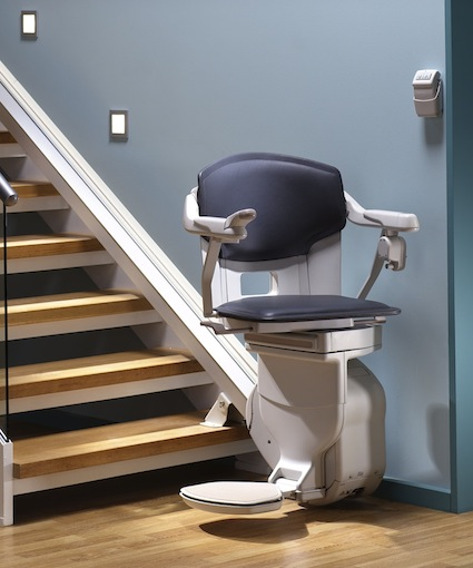 Montascale per scale dritte